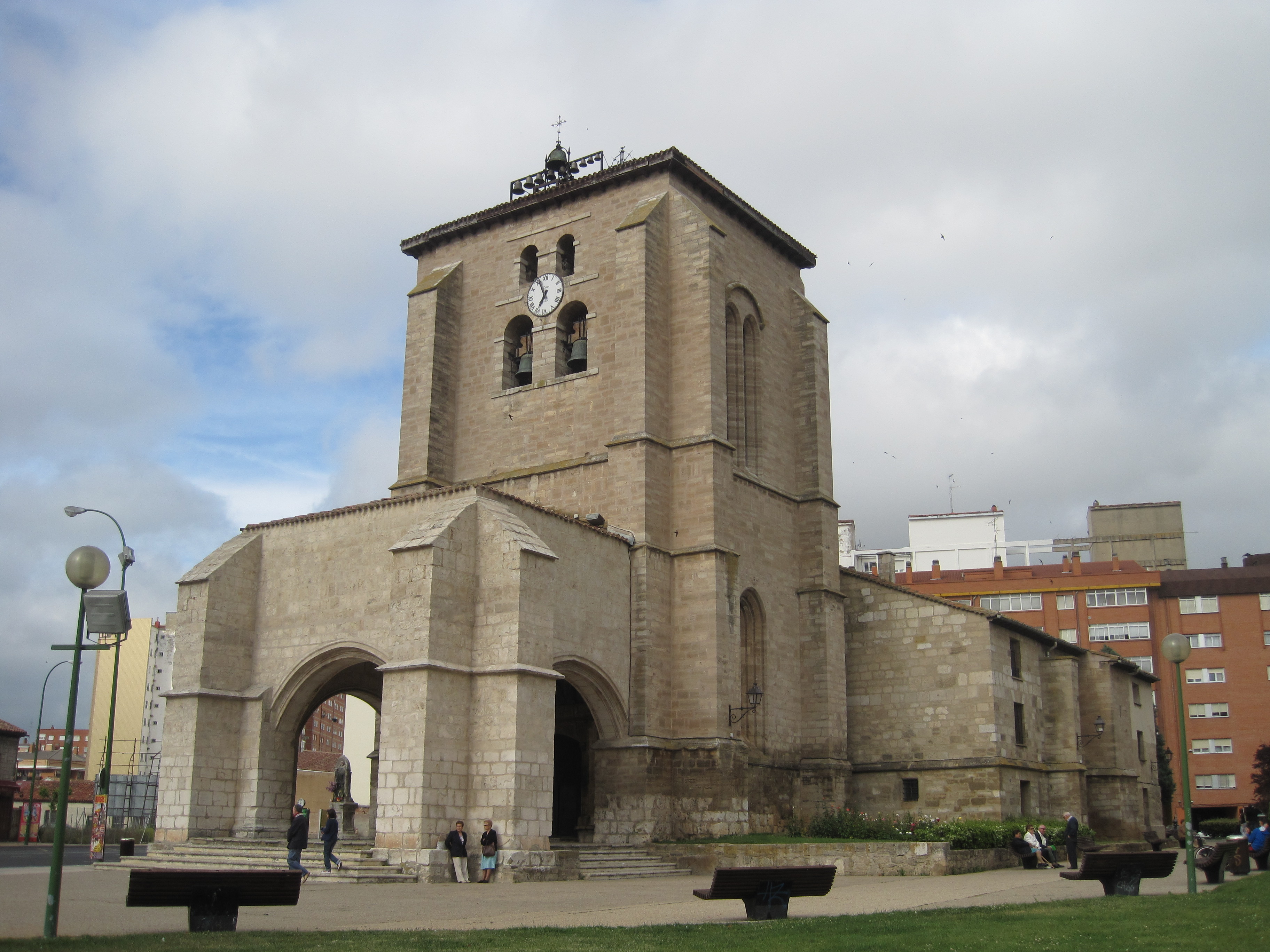 Vista exterior de la iglesia de la Antigua de Gamonal.